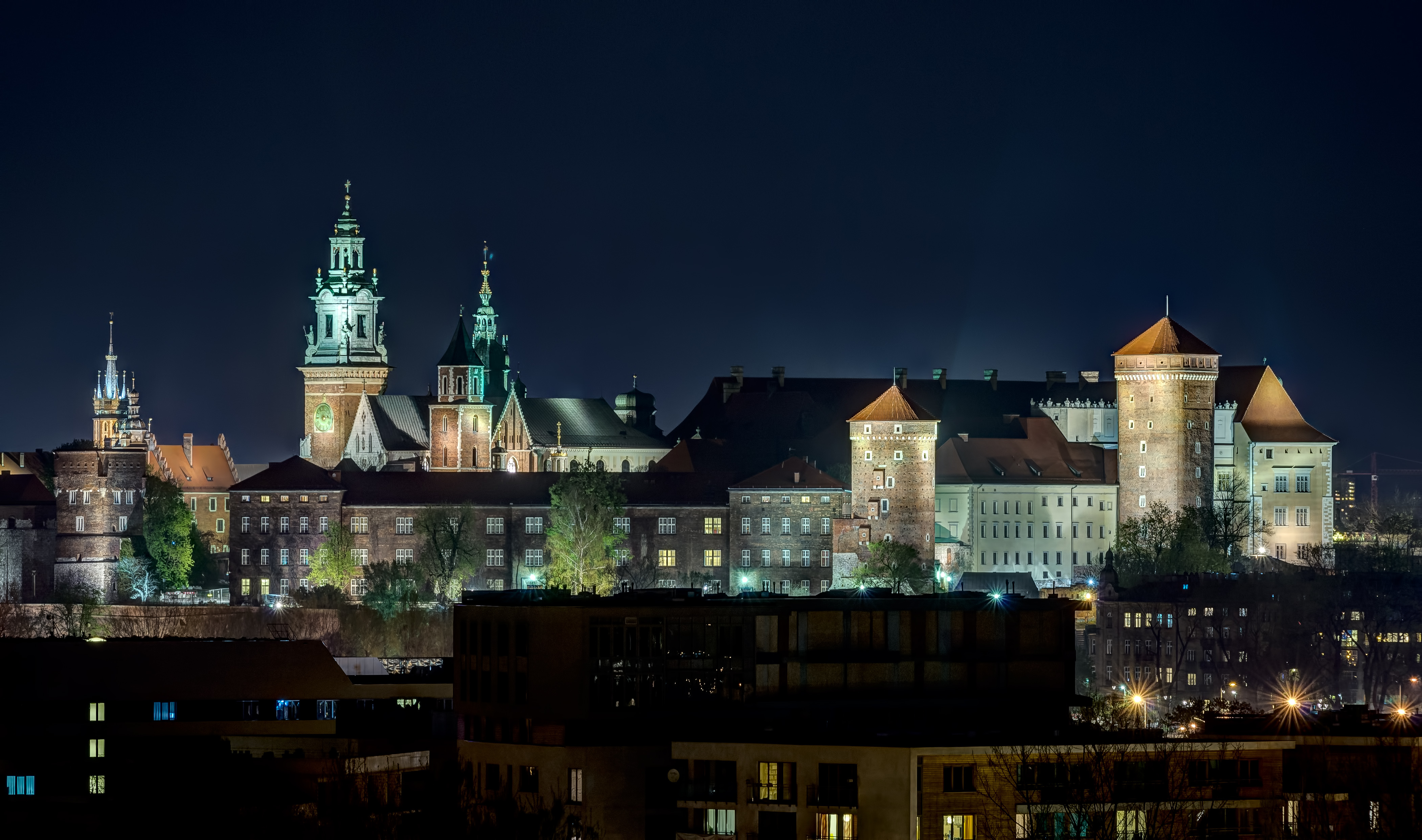 Kraków, zespół Wzgórza Wawelskiego - nocny pejzaż